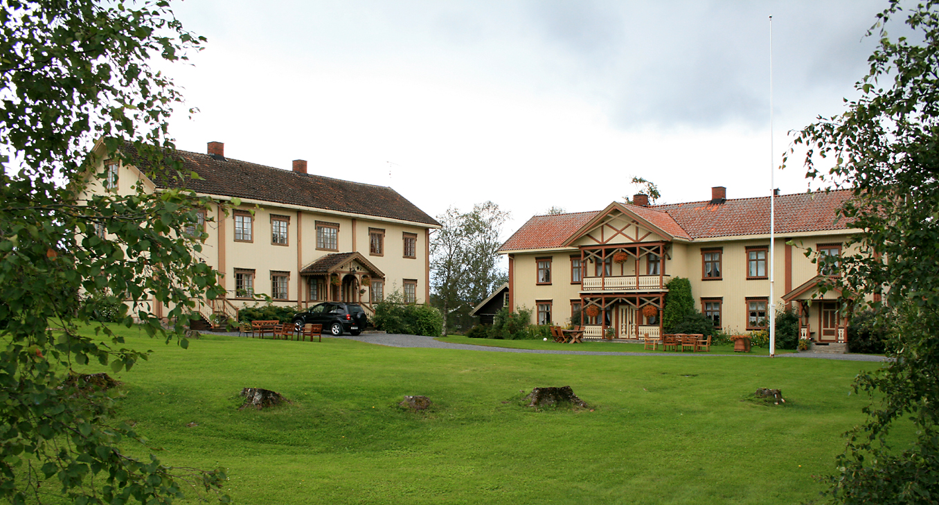 Dyste, Østre Toten, Norway.